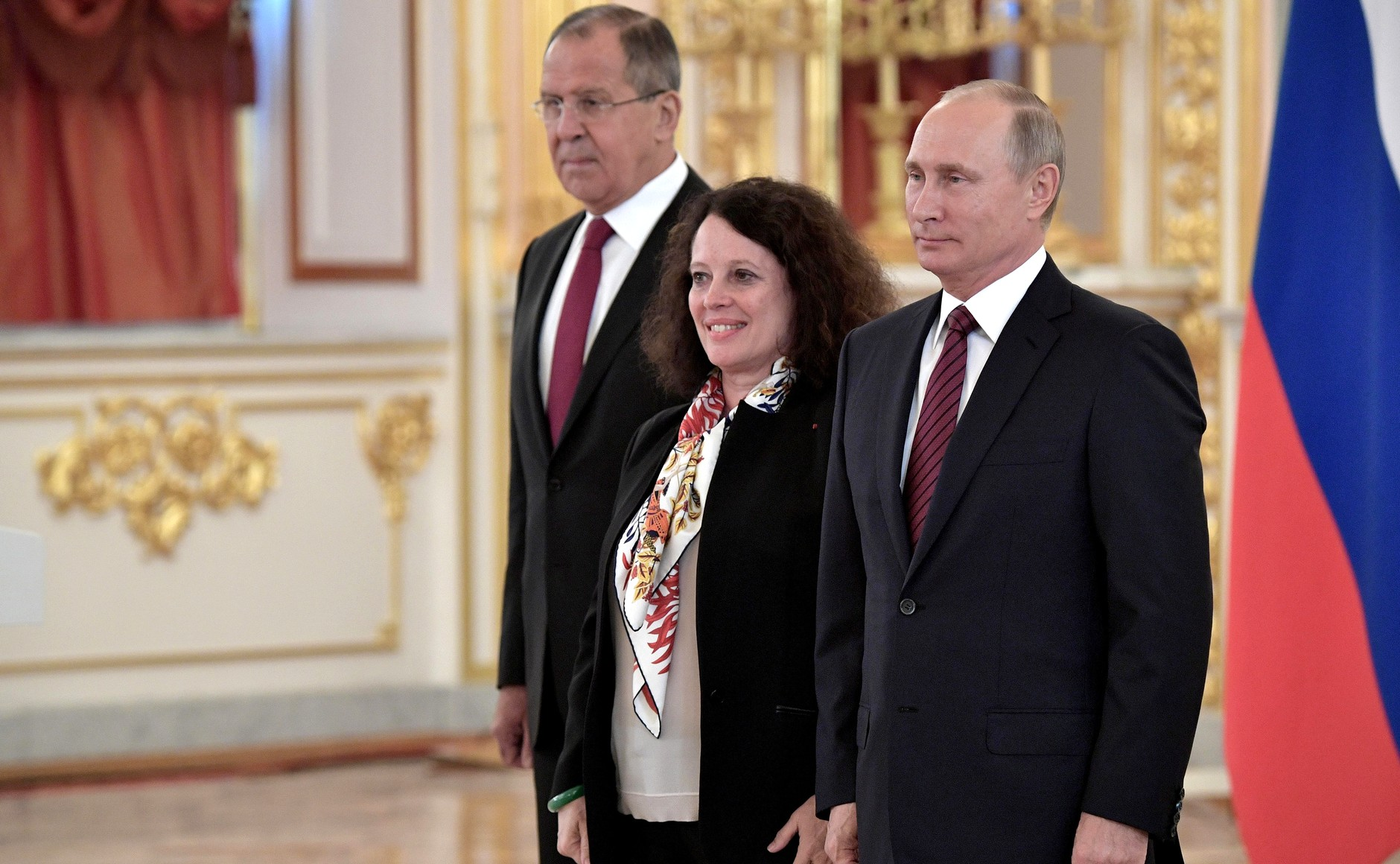 Церемония вручения верительных грамот послами иностранных государств. Верительную грамоту Президенту России Владимиру Путину вручает посол Франции Сильви-Аньес Берманн